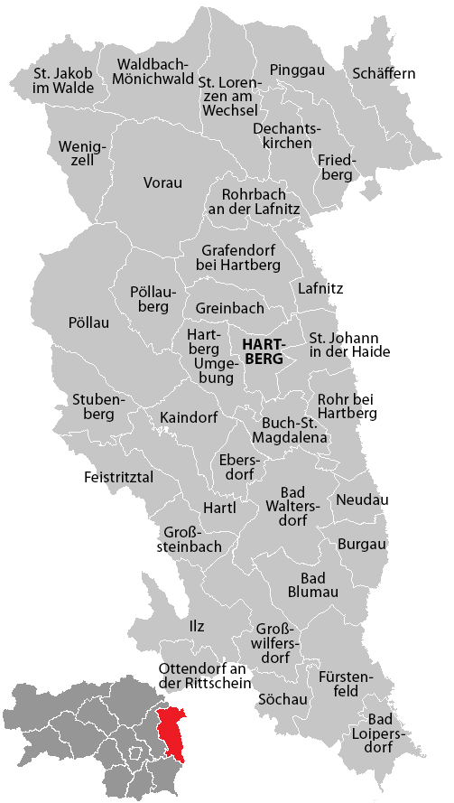 Gemeinden im Bezirk Hartberg-Fürstenfeld (Steiermark), Stand: 1. Januar 2015